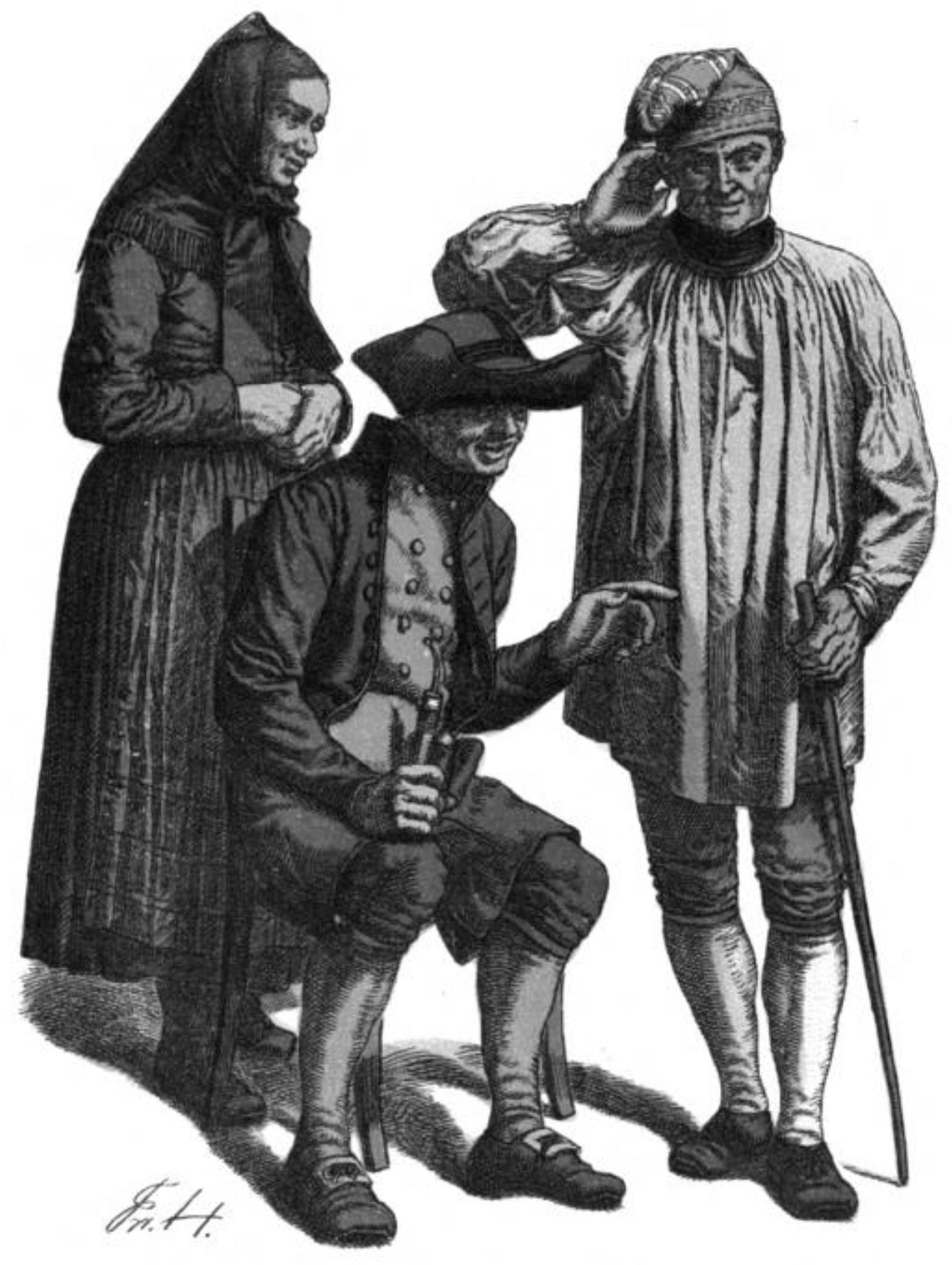 Friedrich Hottenroth: Nassauisches Trachtenbuch Tafel 25: Bauersleute aus Bilkheim (Wallmerod)